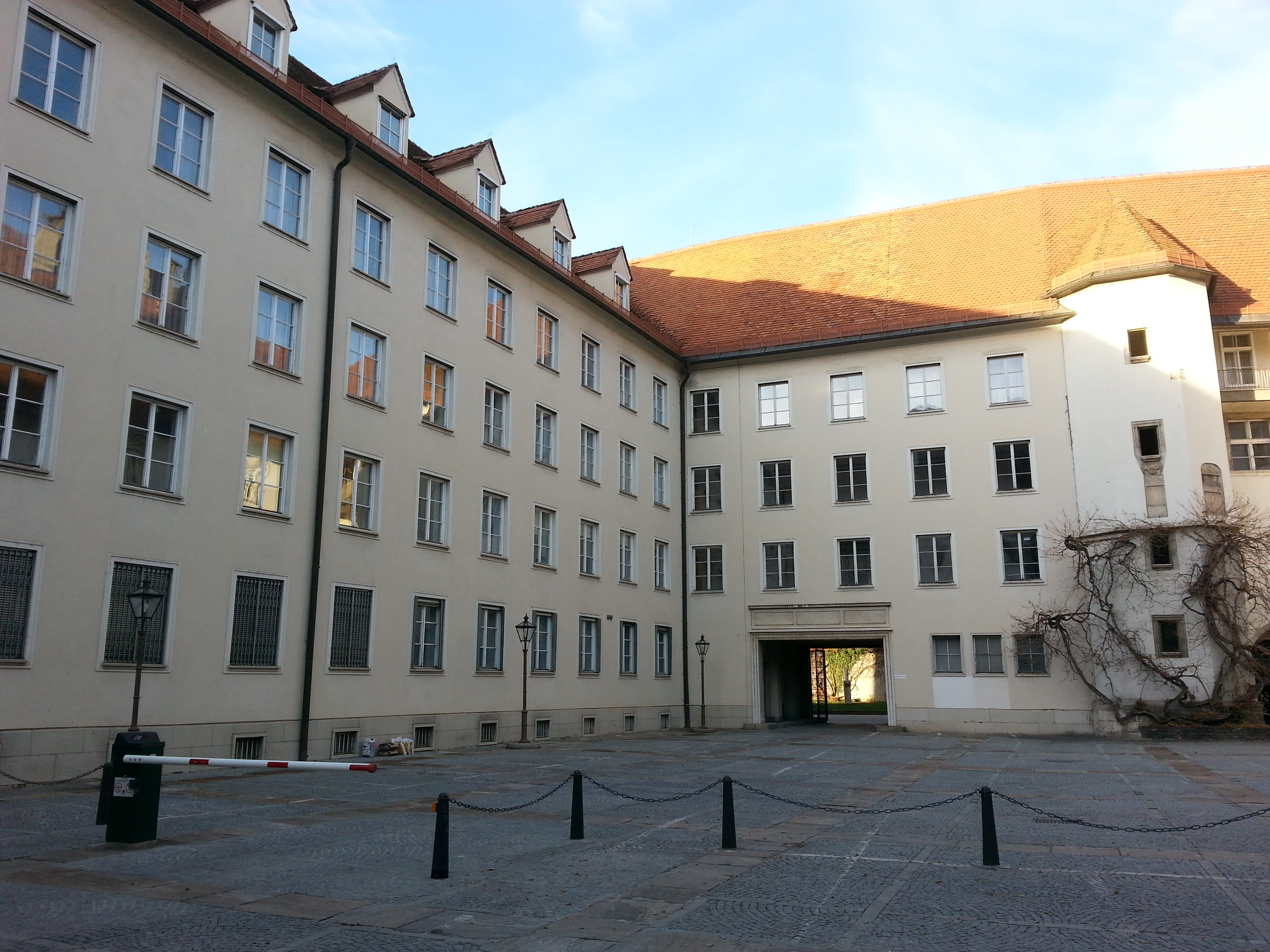 Erster Burghof der Grazer Burg. Links sieht man die Neue Burg und gerade aus befindet sich der Maximilianbau mit dem Treppenturm.